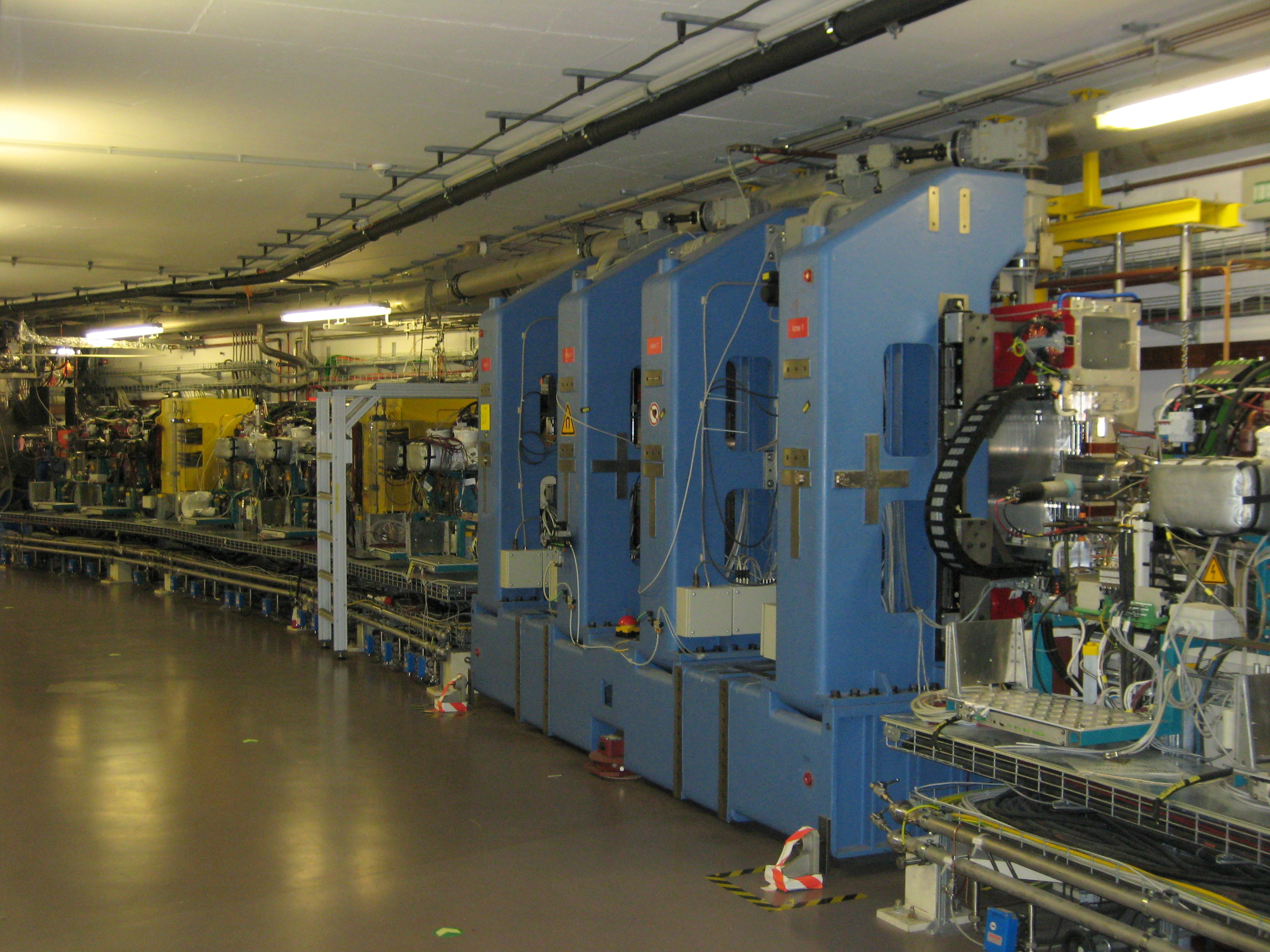 Speicherring von BESSY II (blaues Bauelement: Undulator), Blick entgegen der Strahlrichtung